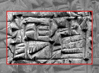 dGIŠ:BIL:PAP.ga.mes (dGIŠ.NE.PAP.GA.MES). Particolare del testo in cuneiforme, sul retro della tavola della Lista degli dèi rinvenuta a Fāra (Šurrupak, circa 2500 a.C.) e oggi conservata al Vorderasiatisches Museum di Berlino. È il primo testimone in assoluto che riporti il nome di Gilgameš. L'ingrandimento, la resa in bianco/nero e l'evidenziazione in rosso sono opera mia.